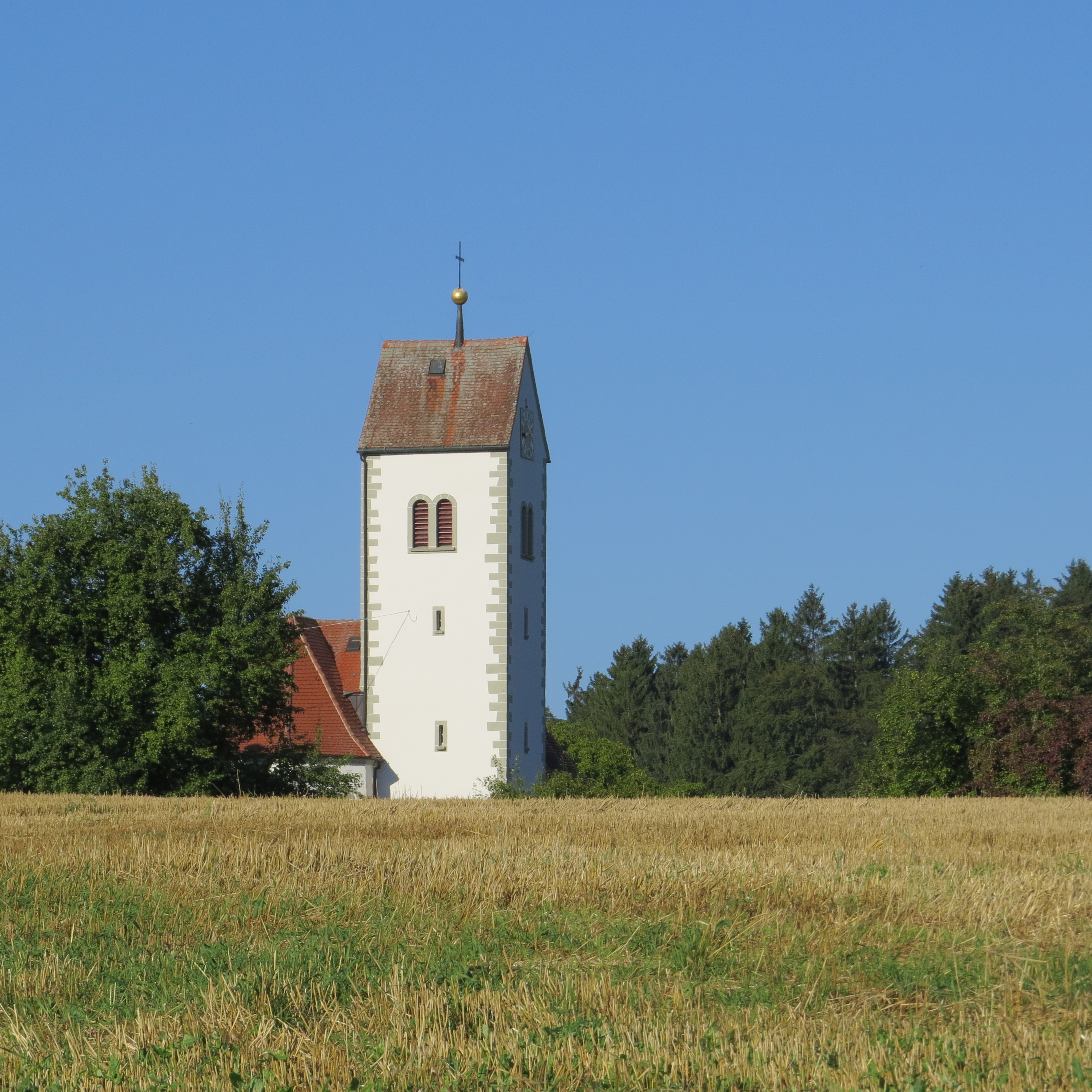 Kirche in Oberhomberg, Deggenhausertal